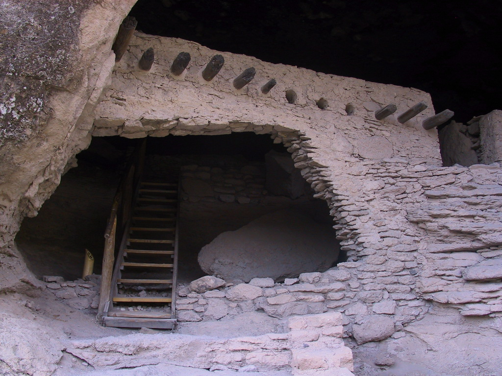 "Einstieg zu einem Cliff Dwellings im Gila Cliff Dwellings NM" Autor: Martin1971 (Bild selbst aufgenommen) Zeitpunkt: 2003